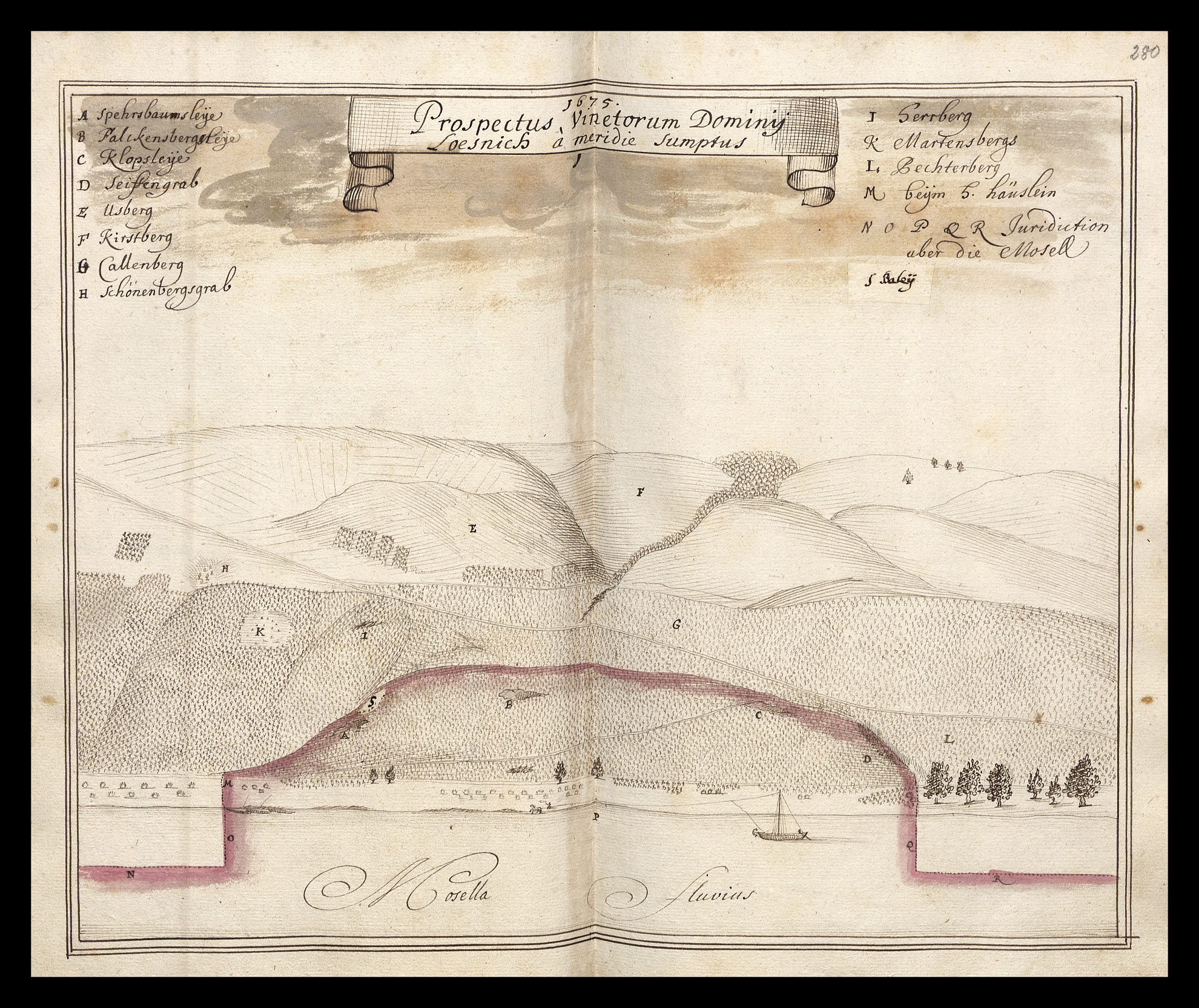 Skizzierung der Herrschaft Lösnich (linke Moselseite) im Lagerbuch Bd III DK5196 der Reichsgrafen von Kesselstatt